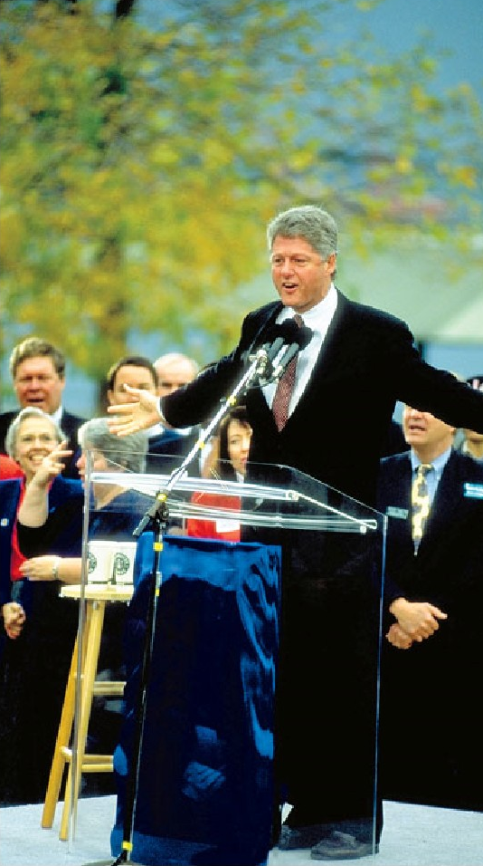 William Clinton Estatu Batuetako Alderdi Demokrataren mitin batean. Estatu Batuetan bi alderdiko sistema bat erabiltzen dute, gainerako alderdiak oso txikiak baitira eta ez baitute gobernatzeko behar adina eraginik.